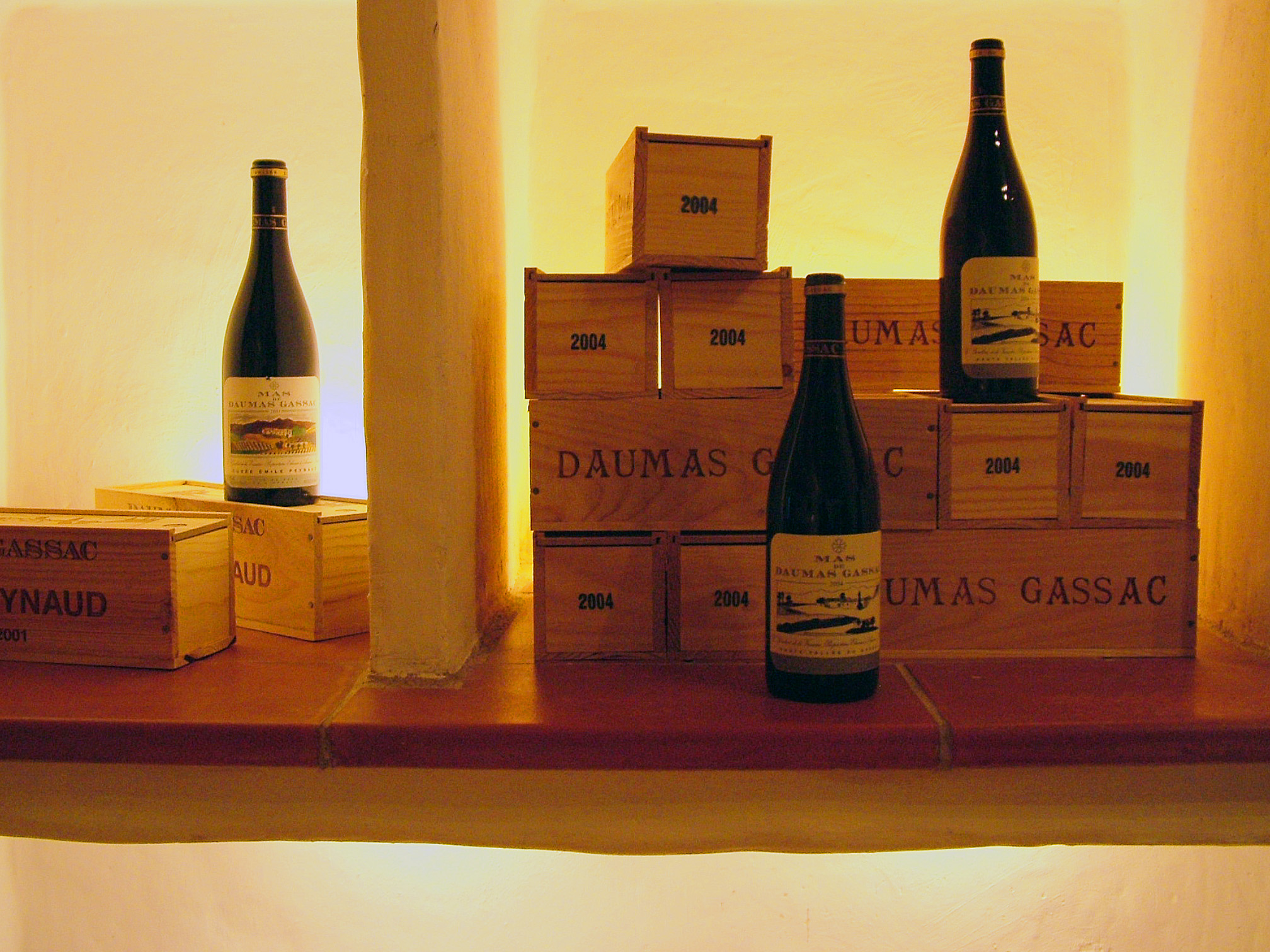 Caveau de dégustation et de vente du mas Daumas Gassac